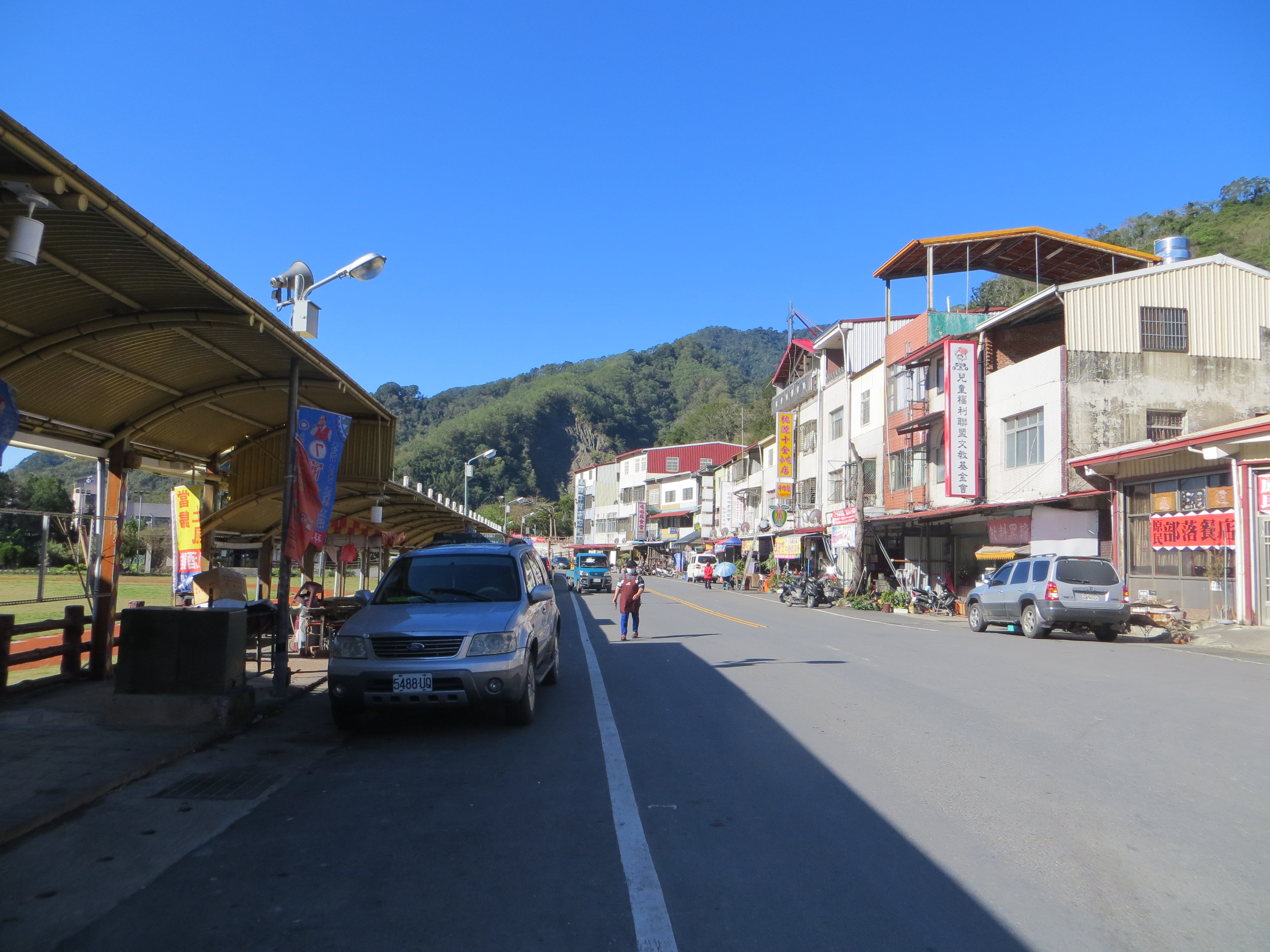 2016年1月9日，桃源區治桃源里街道景觀，朝寶來端攝；左側雨棚分隔桃源國小與南橫公路。